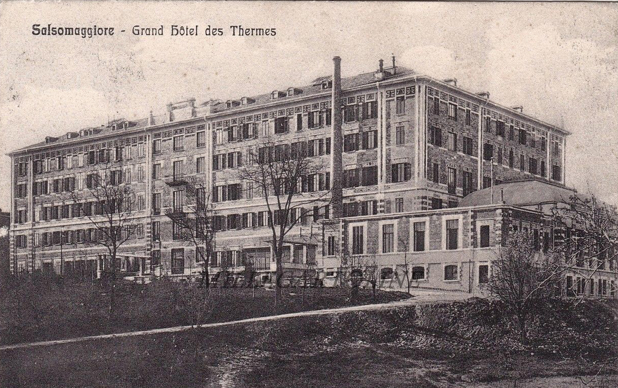 Salsomaggiore Terme - Grand Hotel des Thermes